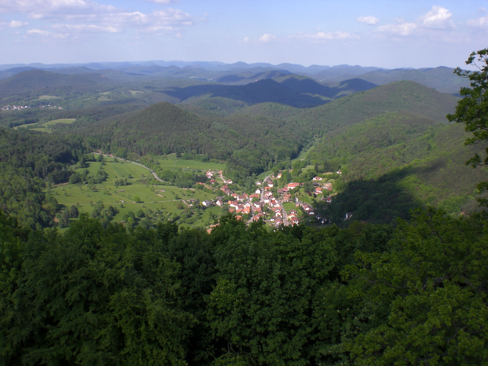 Blick auf Nothweiler von Hohenburg aus